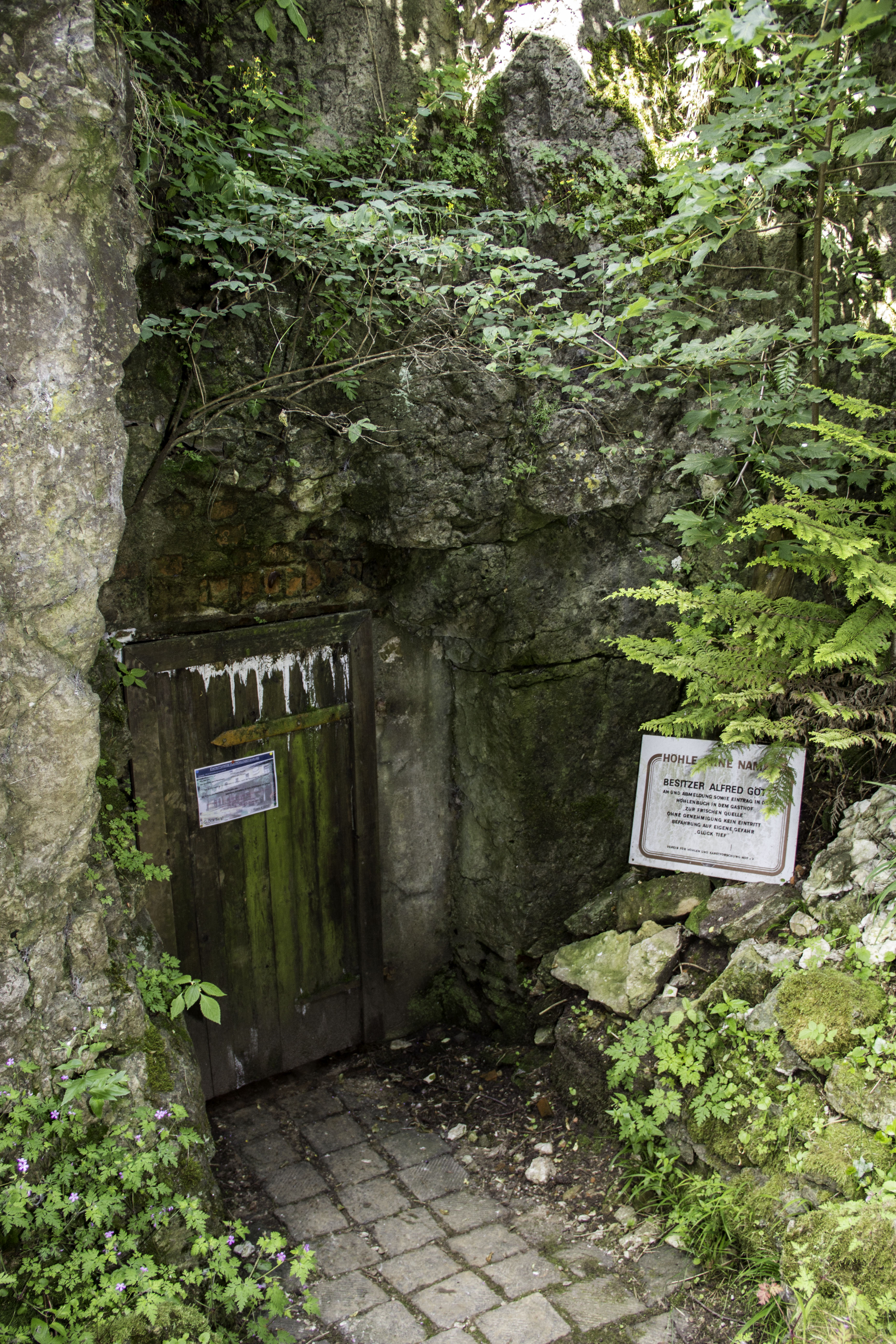 Höhle ohne Namen, Eingang